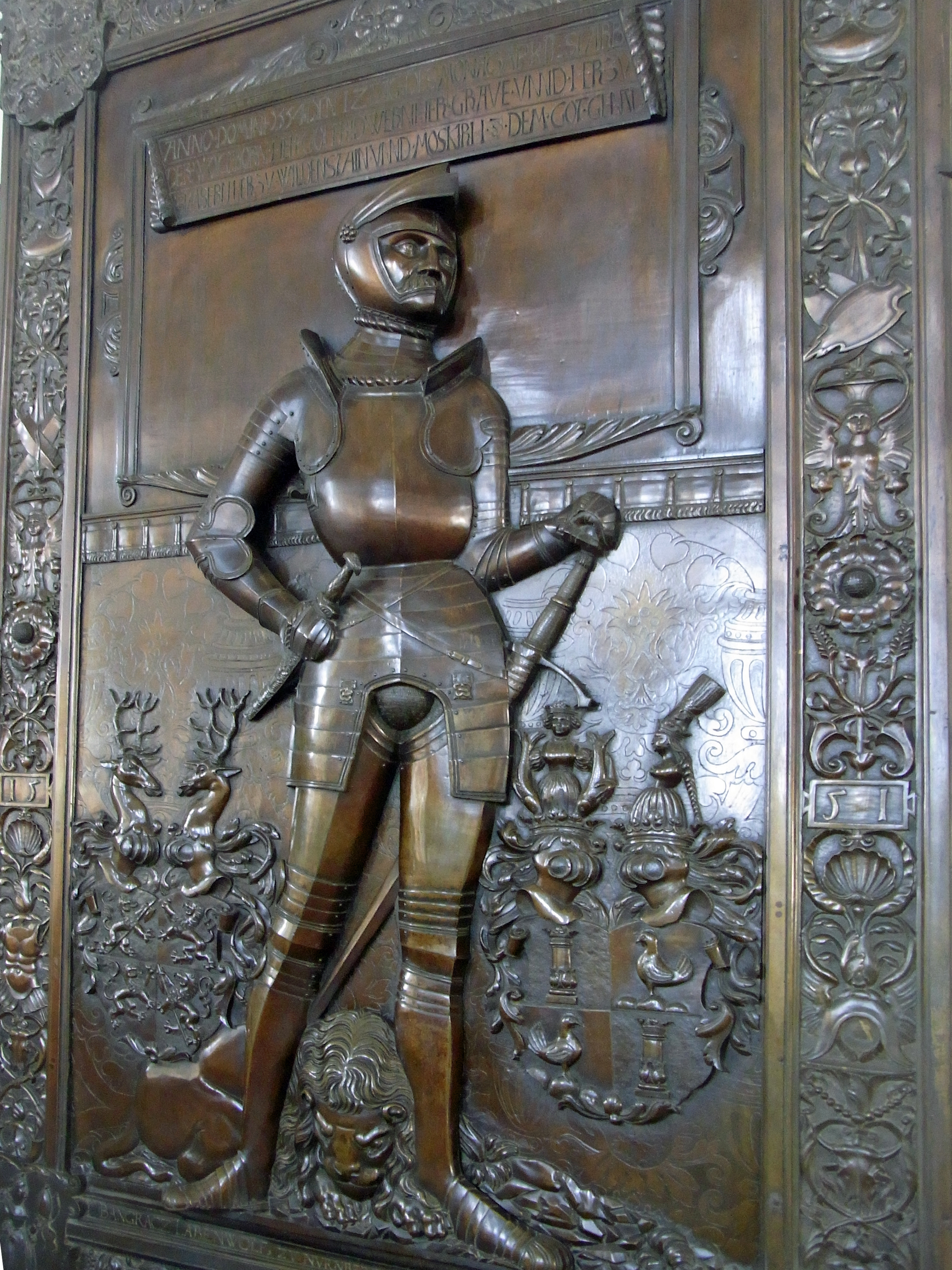 Stadtpfarrkirche St. Martin Epitaph Gottfried Werners von Zimmern